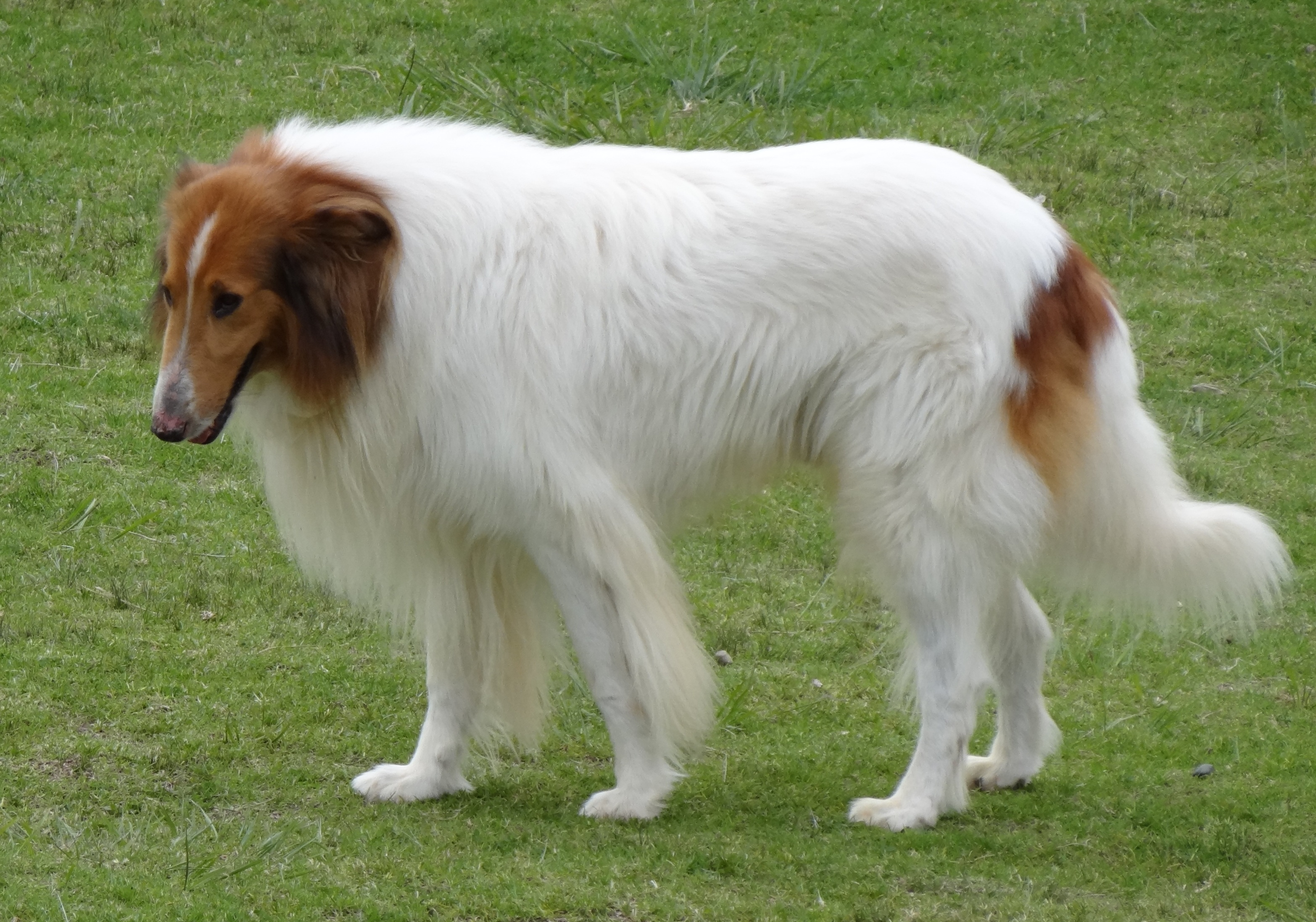 White Rough collie